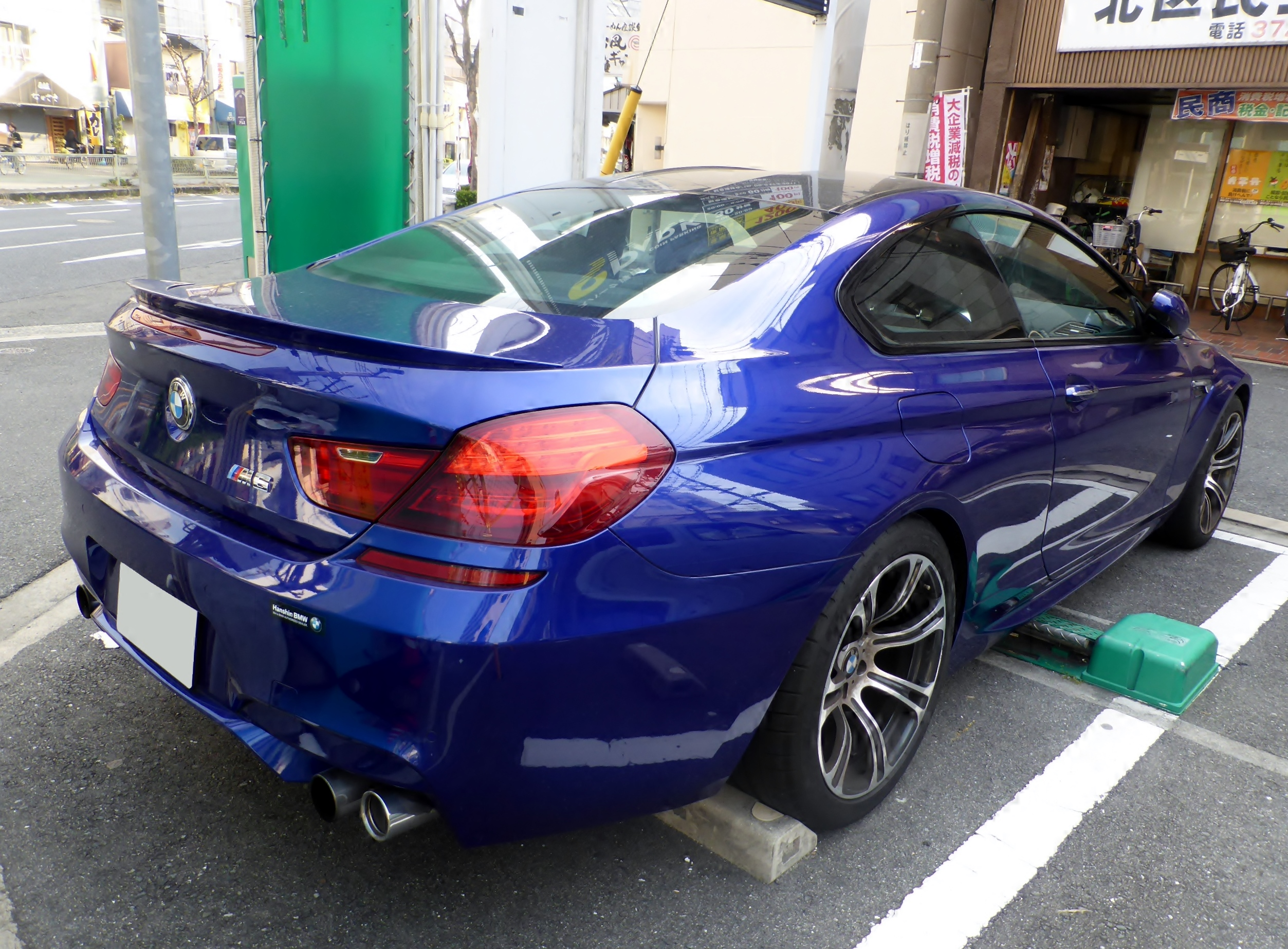 F13型BMW・M6クーペをリアから撮影。